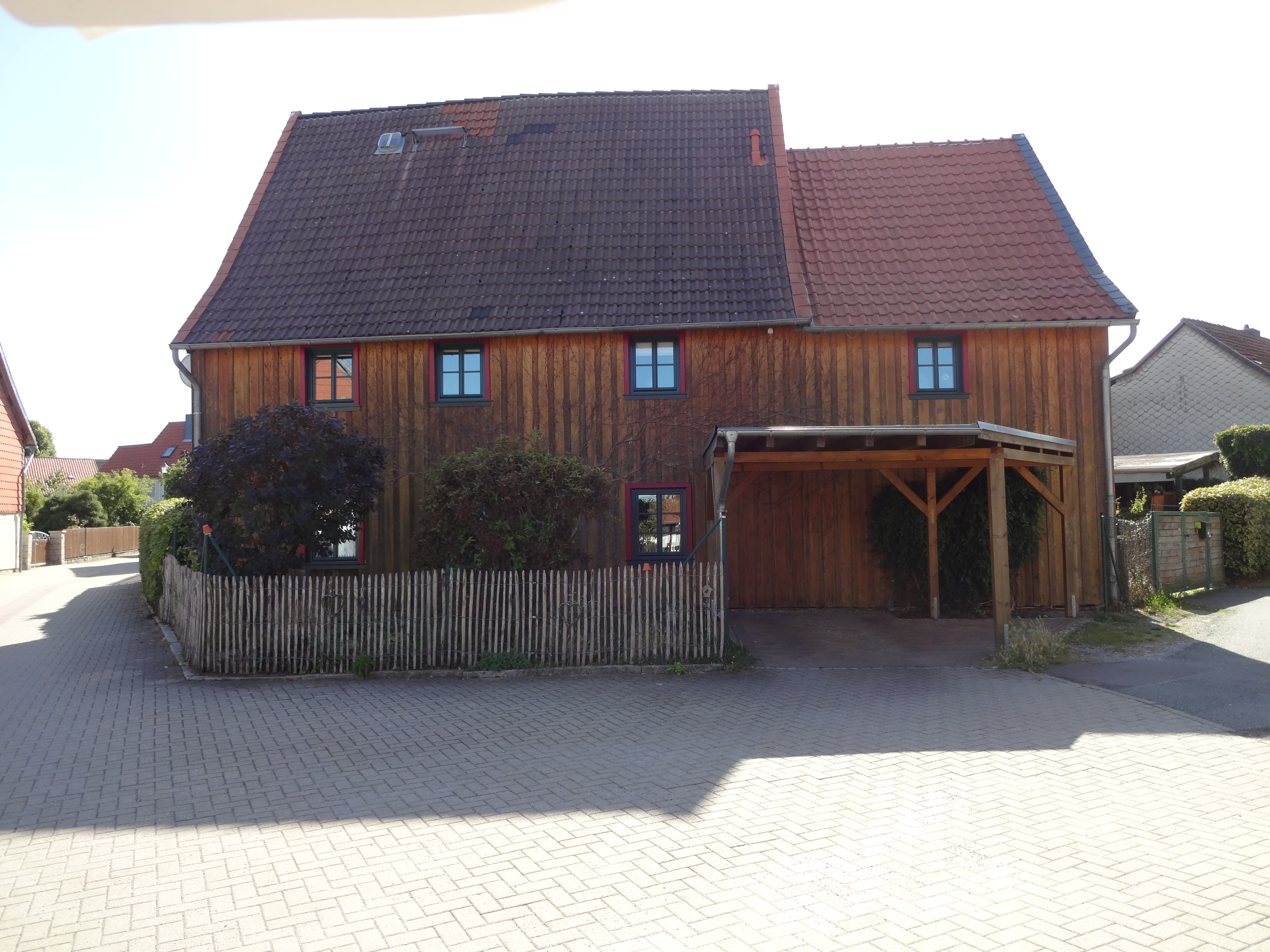 denkmalgeschütztes Wohnhaus in der Schulstraße 4 in Drübeck